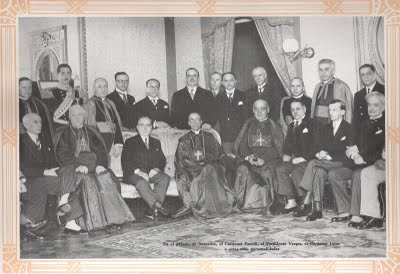 Visita do Cardeal Pacelli, Secretário de Estado da Santa Sé e legado papal, ao Brasil, em 1934, a caminho da Argentina. Na foto ao centro Presidente Getúlio Vargas na extremidade esquerda, sentado, o Sr. Antonio Carlos Andrrada, Presidente do Parlamento.